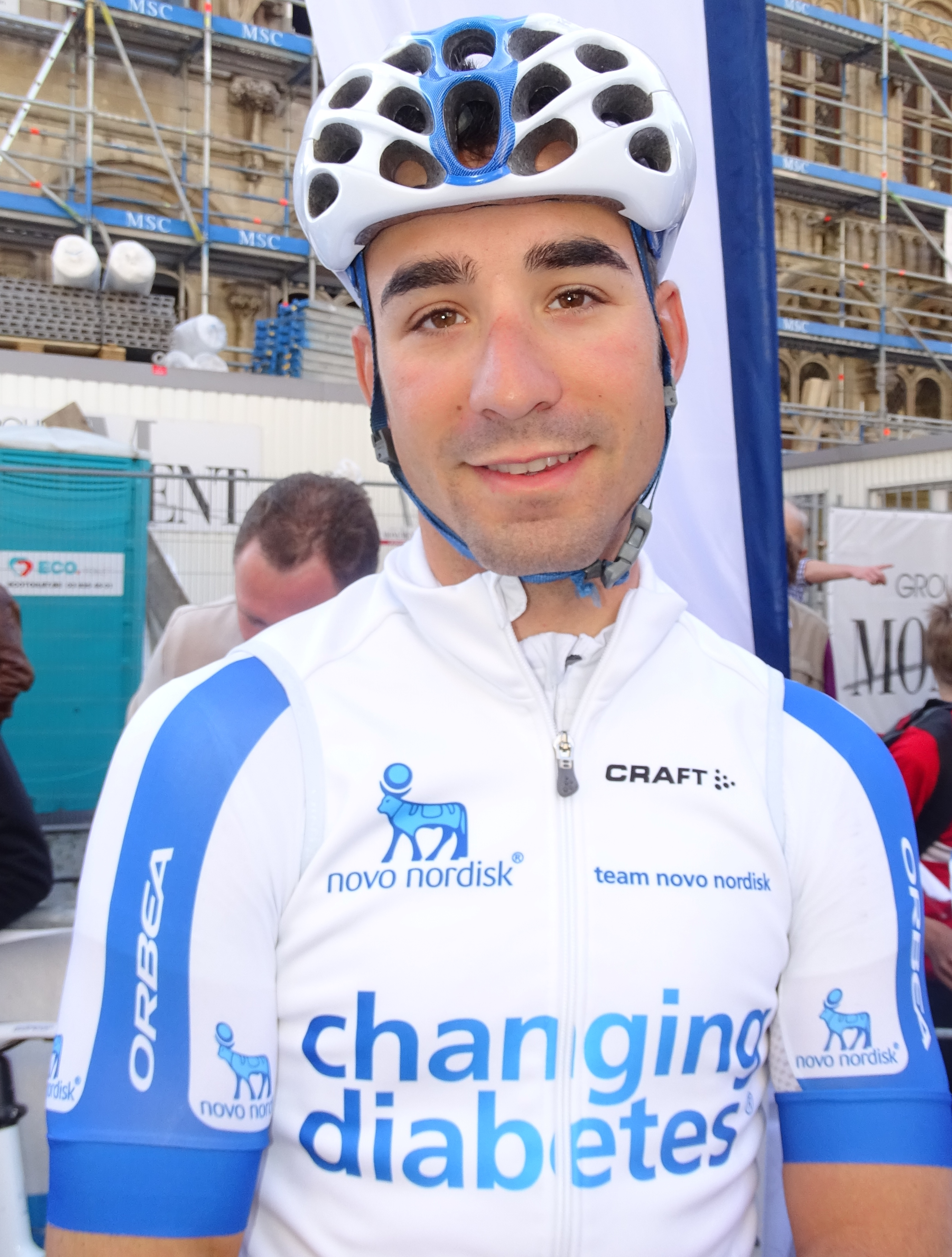 Reportage réalisé le mercredi 15 avril à l'occasion du départ de la Flèche brabançonne 2015 à Louvain, Belgique.